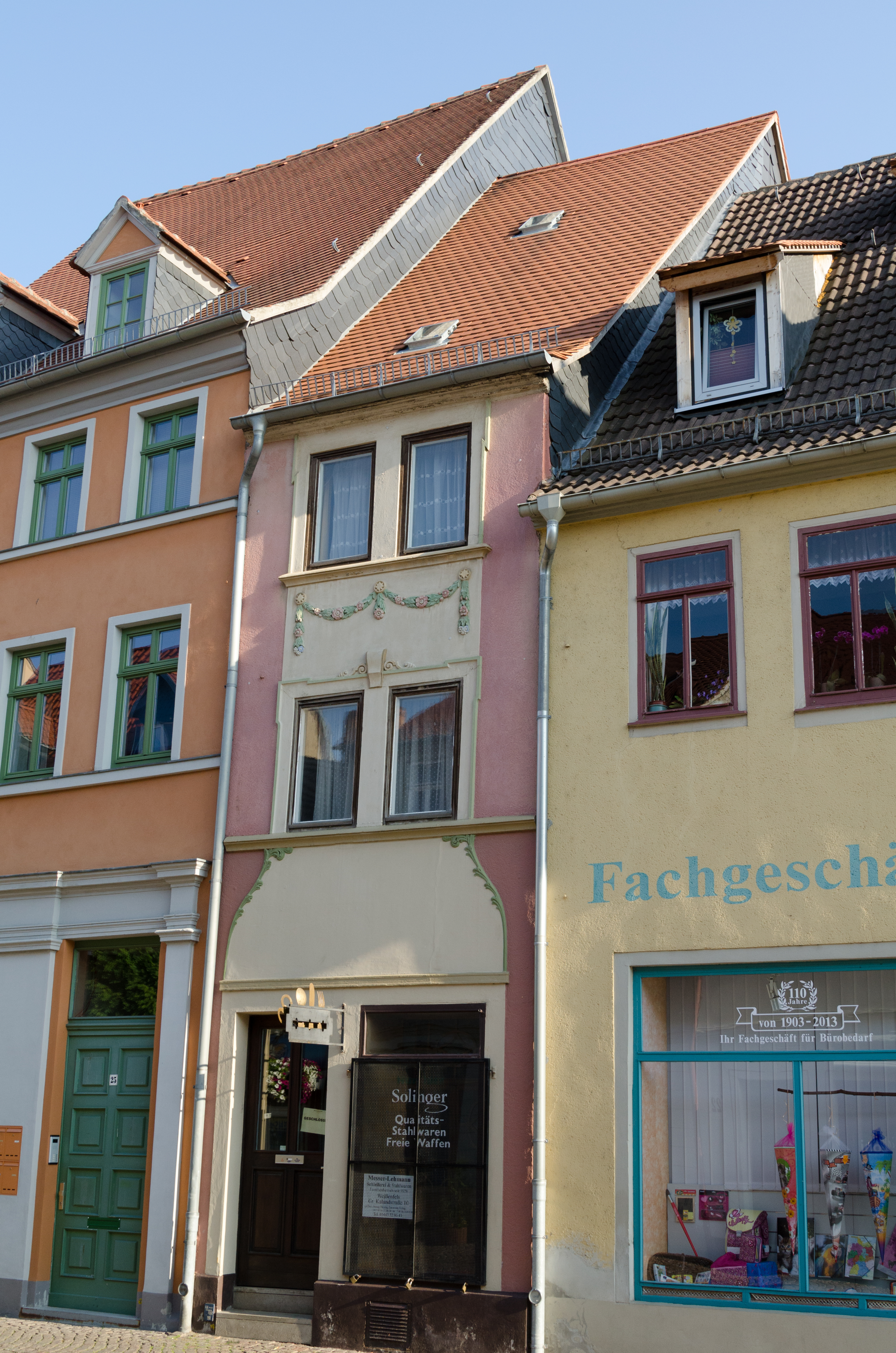 Naumburg, Salzstraße 24